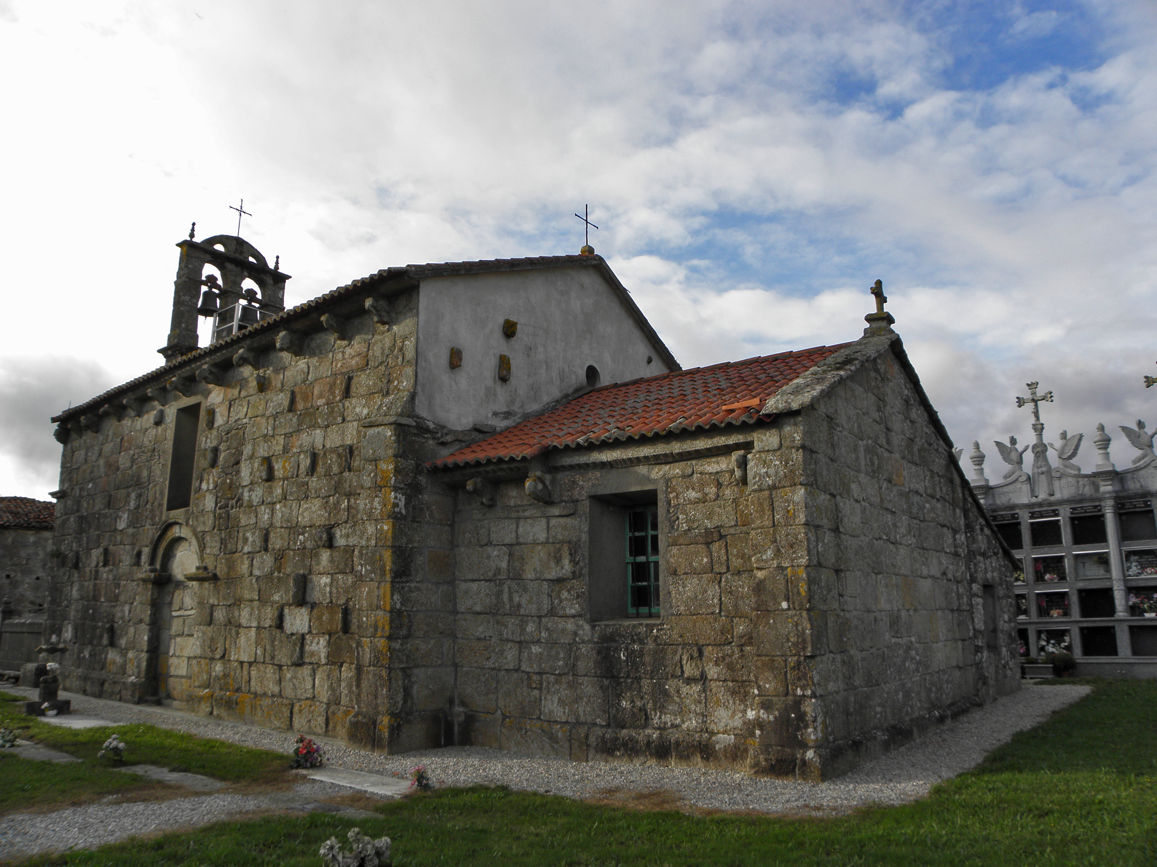 Santa Mariña das Maroñas, Mazaricos Construída a finais de o s. XII, pero foi reconstruída no s. XVIII. Ten unha nave de planta rectangular, muros de cadeirado granítico e cuberto a dúas augas. A fachada ten unha porta alintelada enmarcada por outra maior arqueada. Hai un tímpano decorado coa imaxe de Santa Mariña en relevo e unha ventá rectangular. Canecillos con figuras humanas, animais e vexetais sosteñen a cornixa. Sancristía pegada a un dos laterais da nave. Espadana con dous vans enmarcados por arcos de medio punto rematada en frontón curvo. Ten retablos con imaxes no interior.